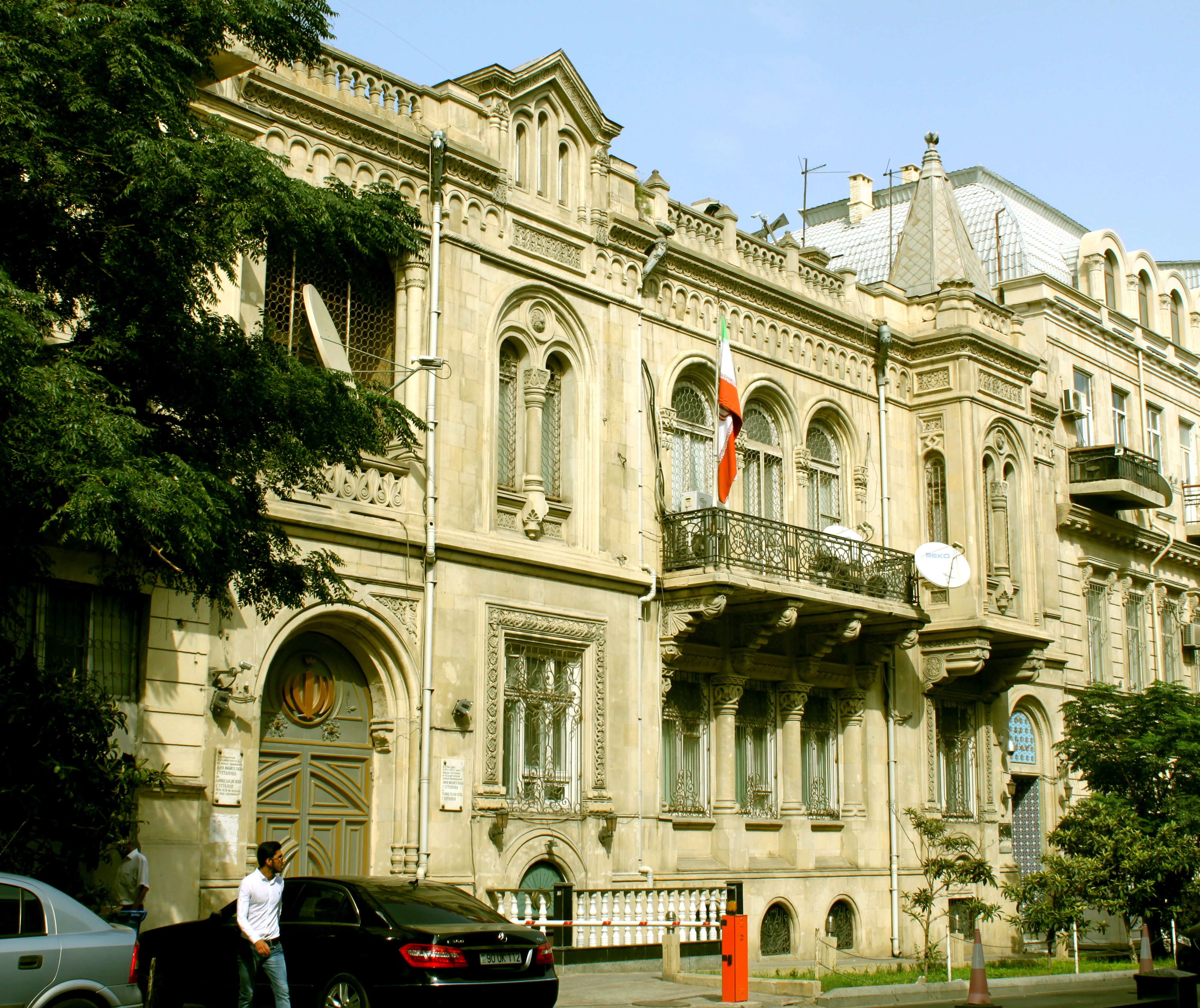 İran səfirliyinin binası